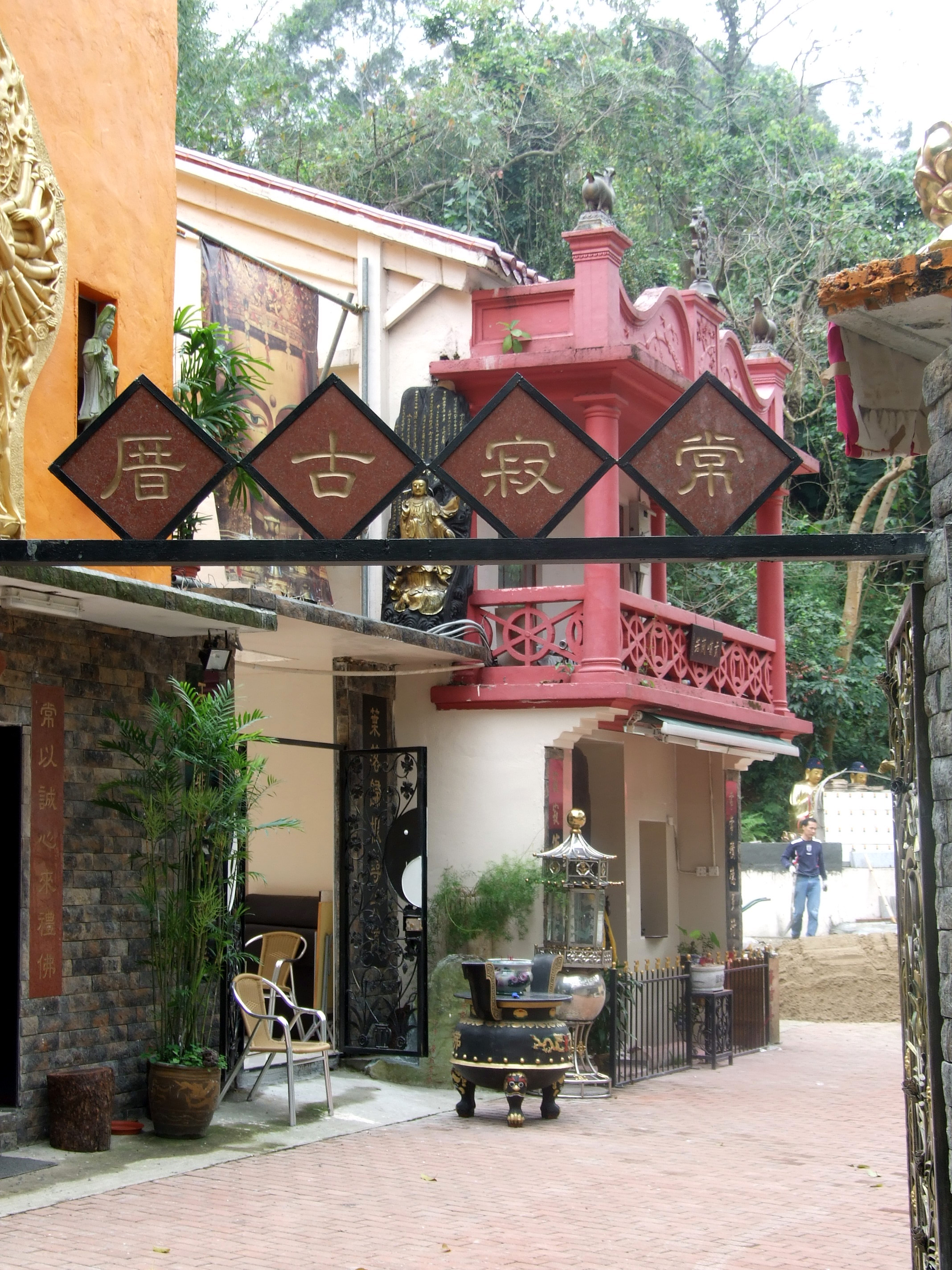 中文（香港）: 重修後的常寂園